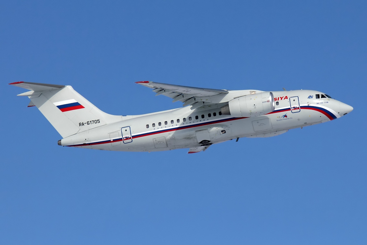 Rosssiya Antonov An-148-100B